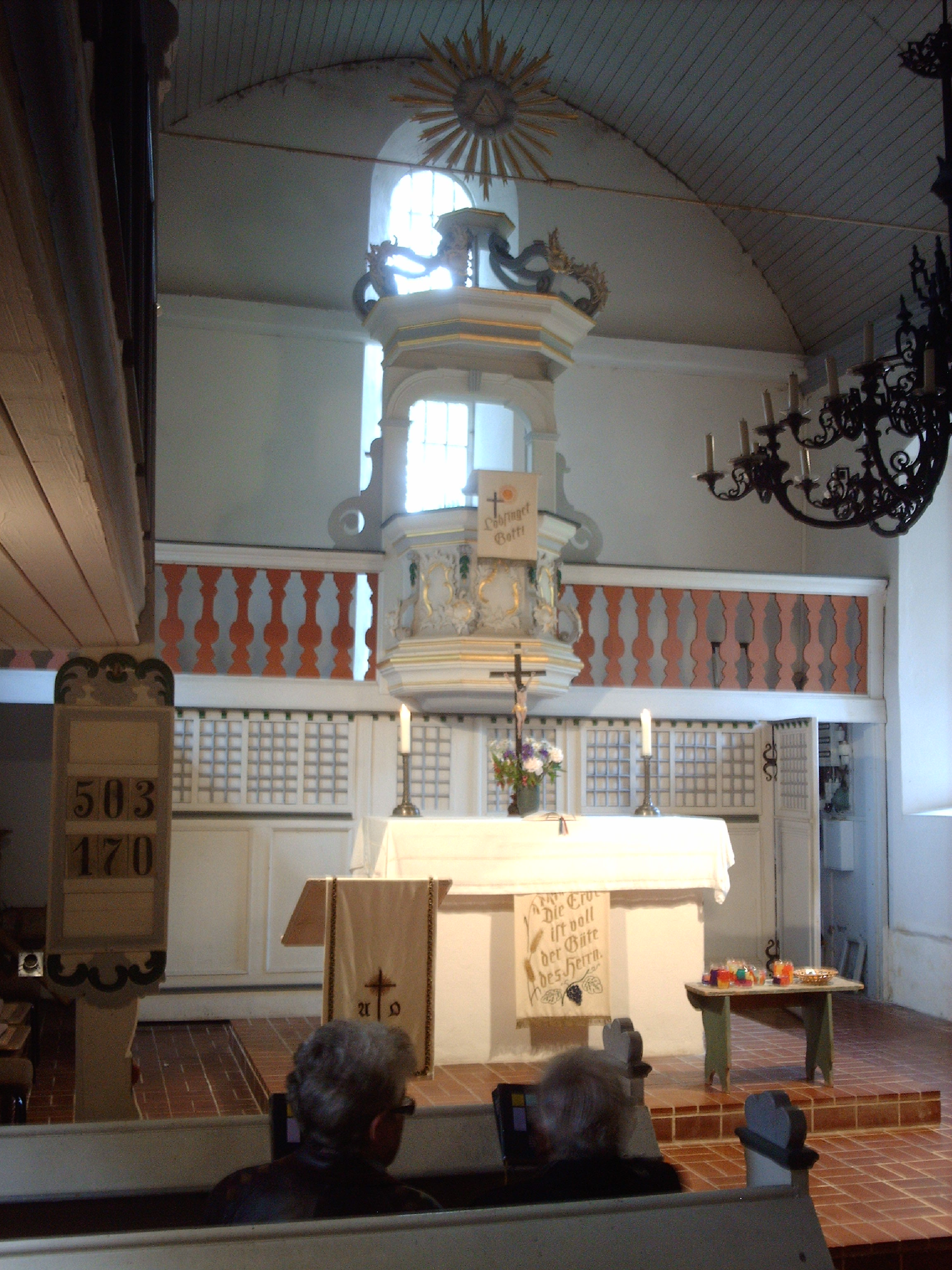 Die evangelische Dreifaltigkeitskirche in Holzhausen (Wachsenburggemeinde)/Deutschland, Innenansicht